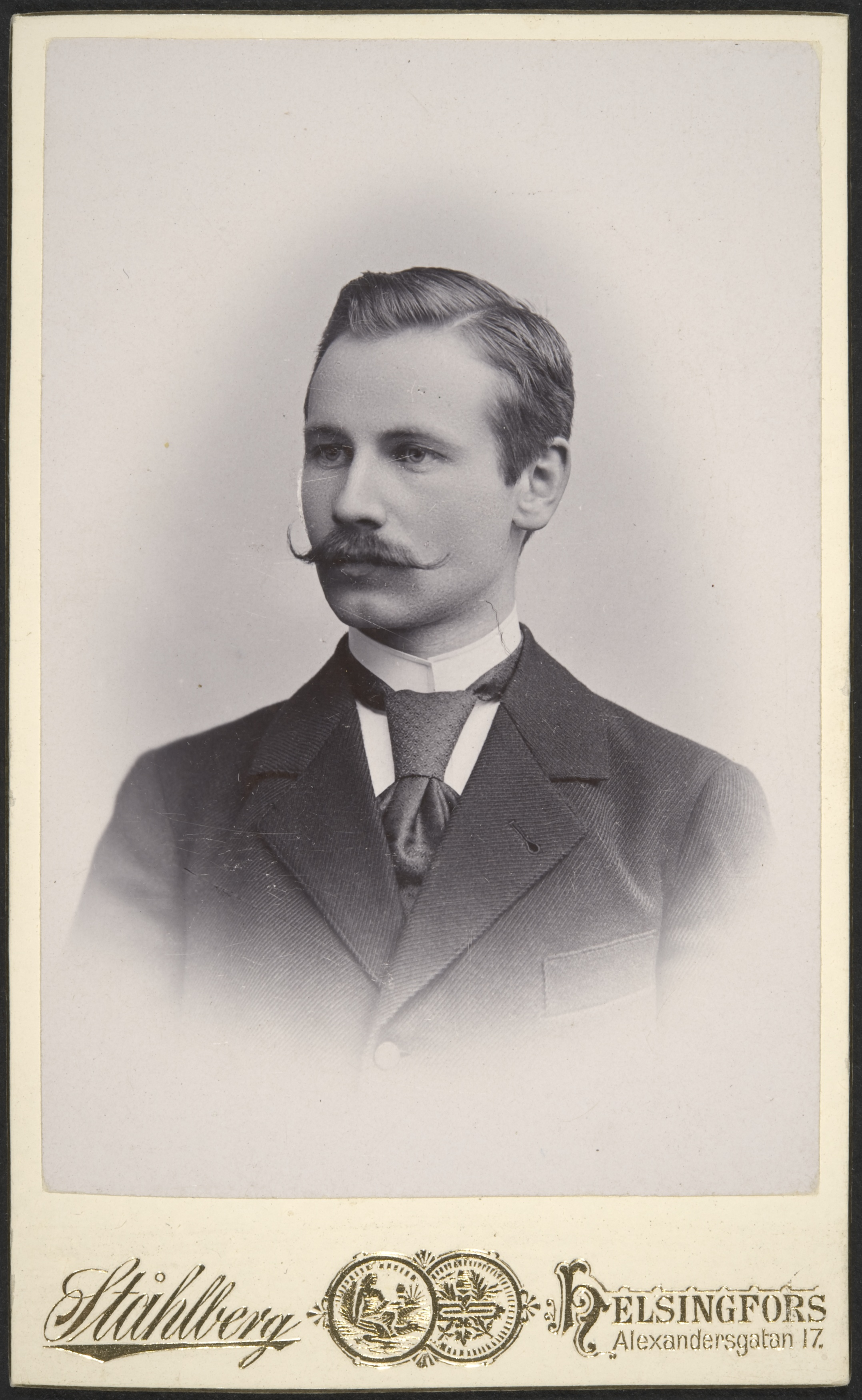 Финский математий Карл Зундман (1873-1949)